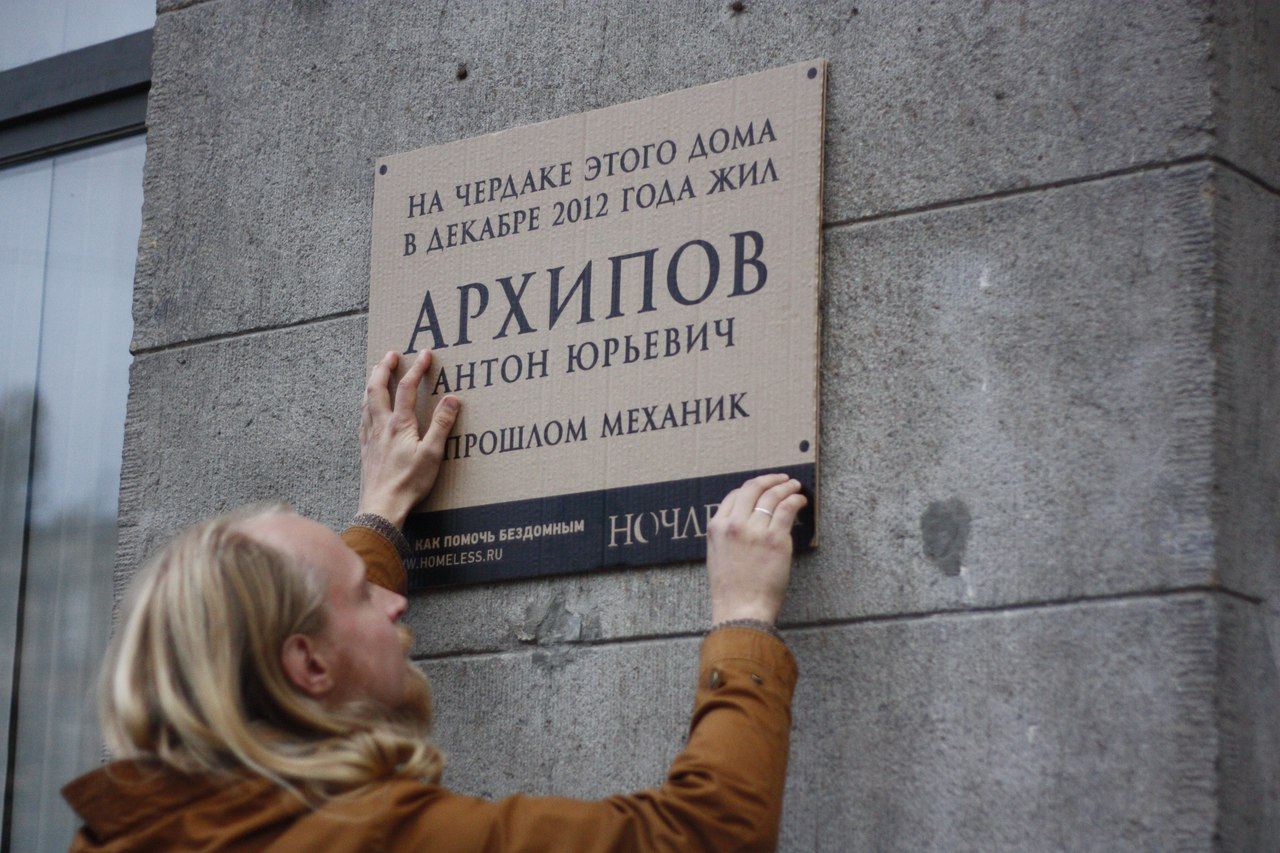 Акция Ночлежки "Дома для бездомных"